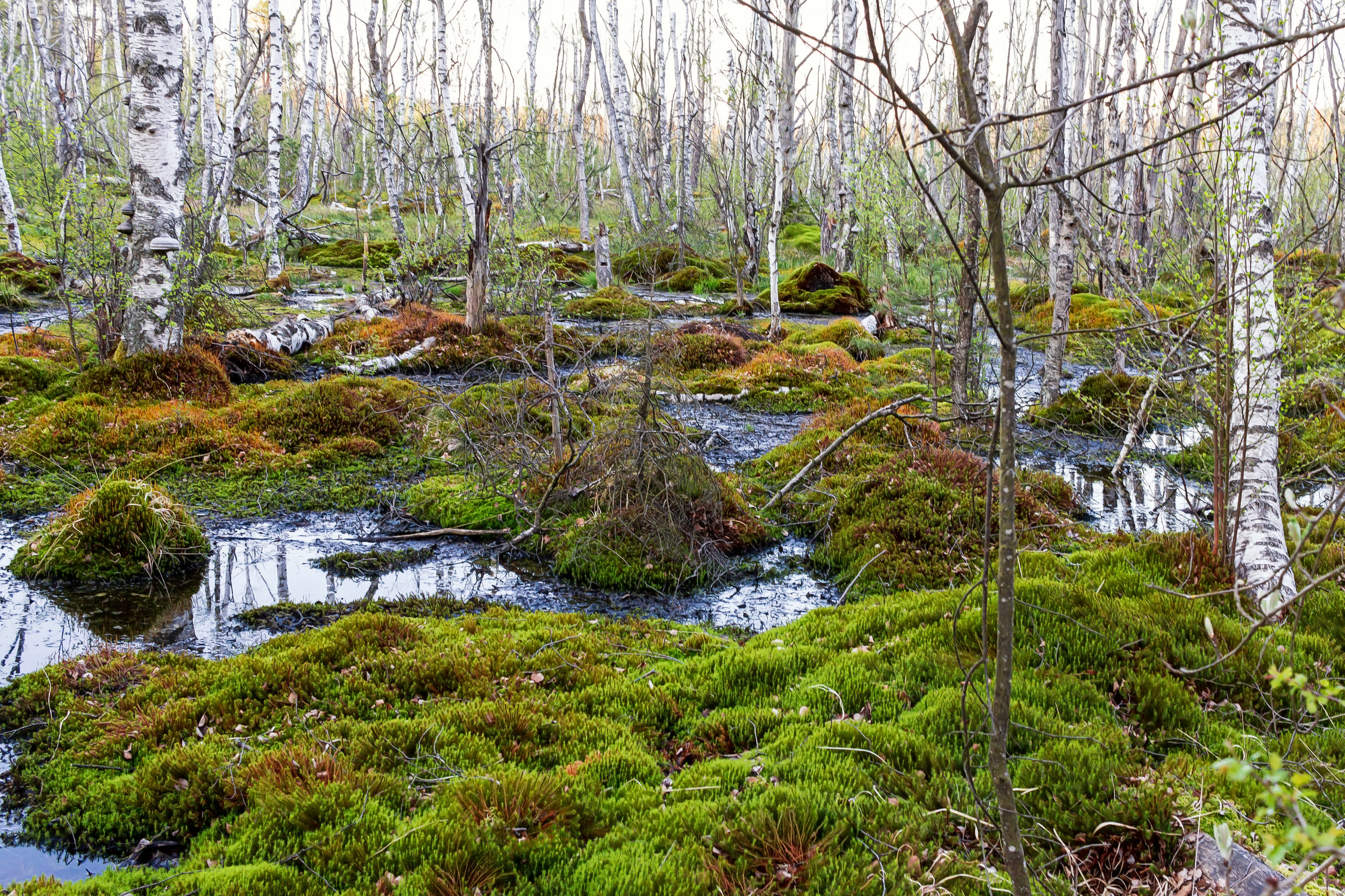 Naturschutzgebiet Schwenninger Moos – Das Schwenninger Moos befindet sich 705 m ü. NN. auf der Baar, am Südrand der großen Kreisstadt Villingen-Schwenningen. Es ist ein etwa drei Quadratkilometer großes Moorgebiet.